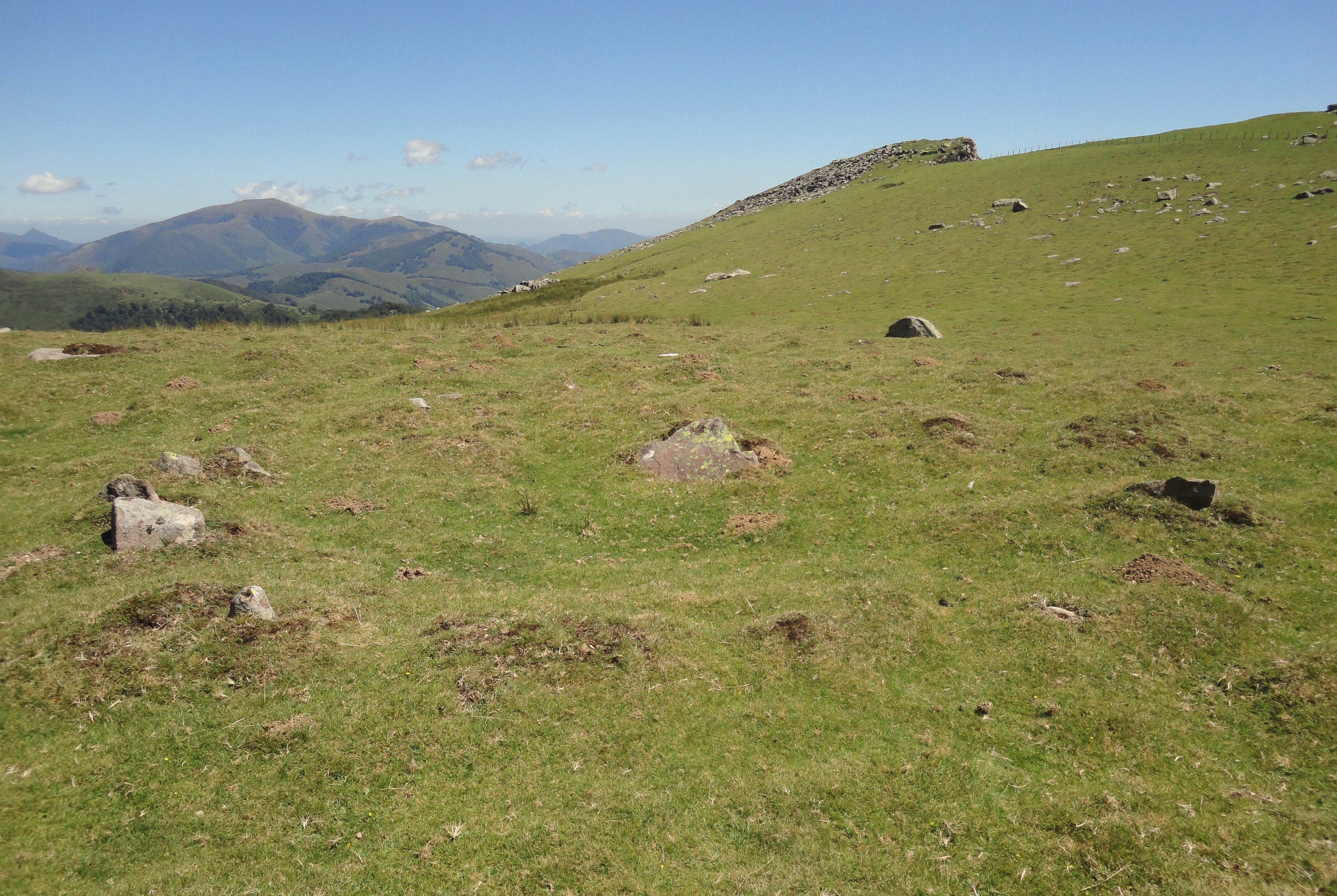 Argintzu lepoa 3 harrespila